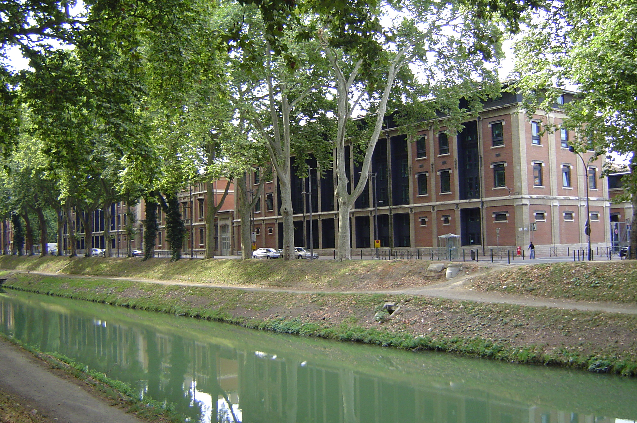 Ancienne Manufacture des Tabacs à Toulouse (France)